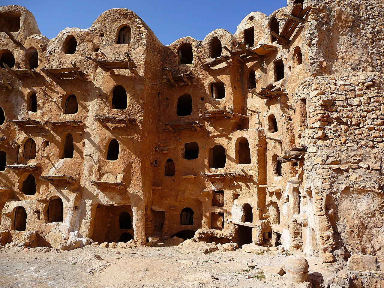 Cabau